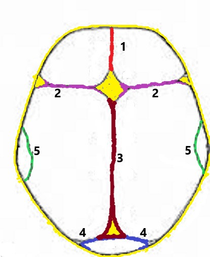 Kafatası eklemleri